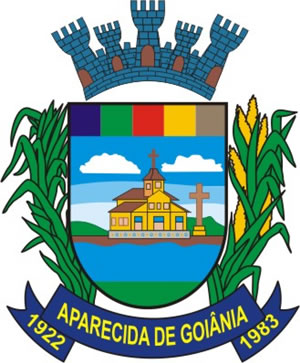 Brasão de Aparecida de Goiânia retirado do site Aparecidanet.